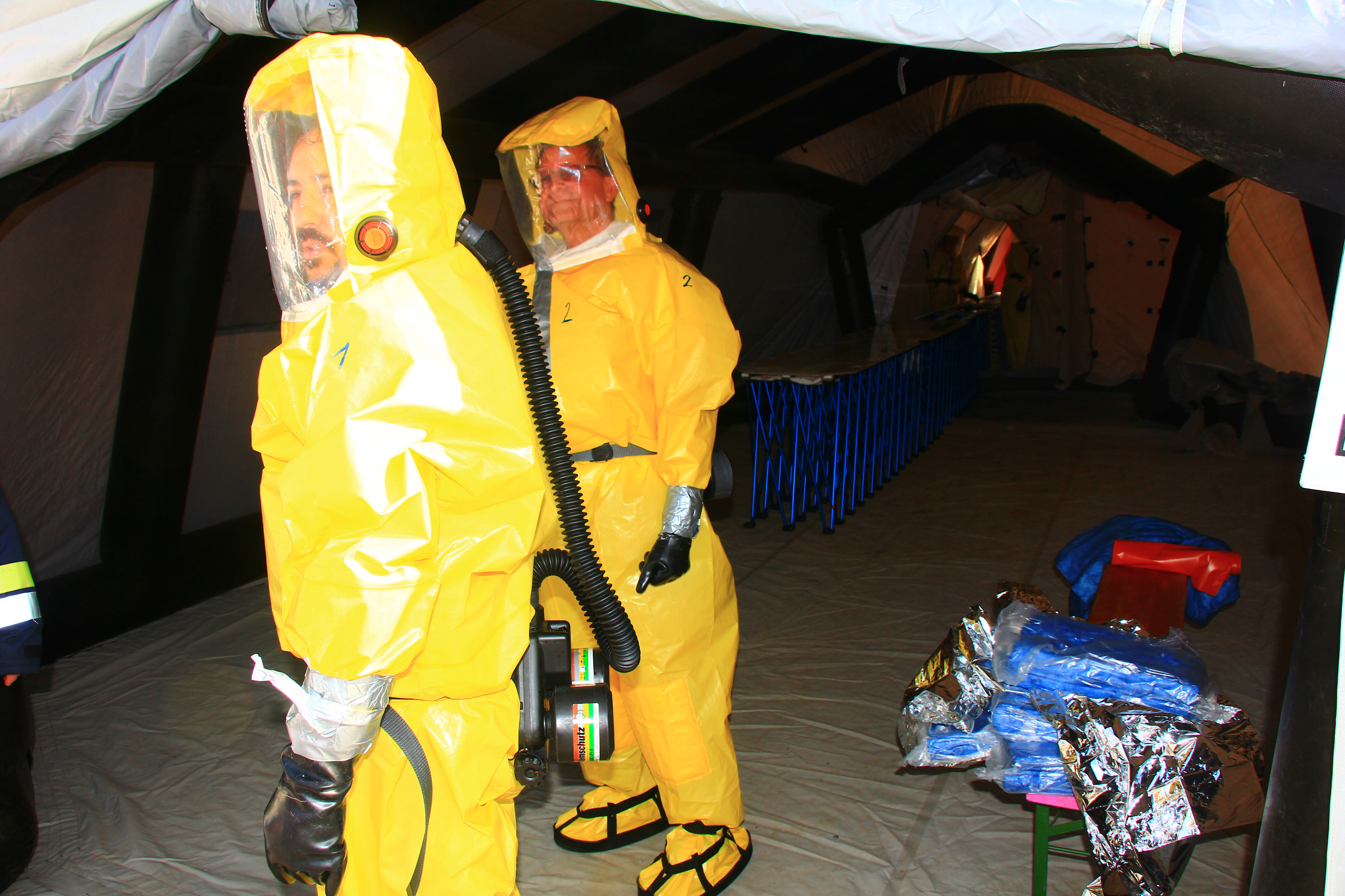 Landesstrahlenschutzübung 2015 in Schrems, Niederösterreich - Teilnahme der Feuerwehr, Rotes Kreuz und Polizei